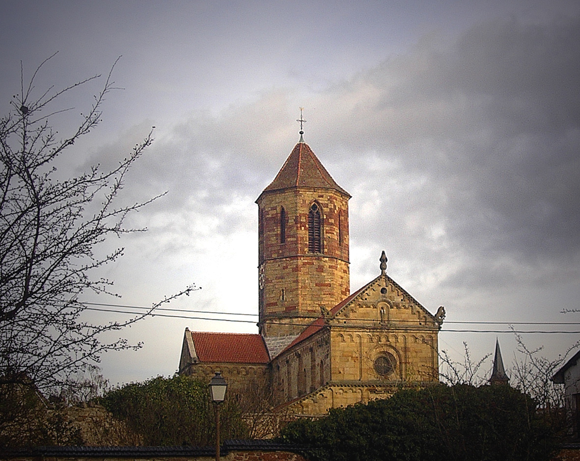 L'église Saints-Pierre-et-Paul de Rosheim dominant les ruines du Meyerhof.